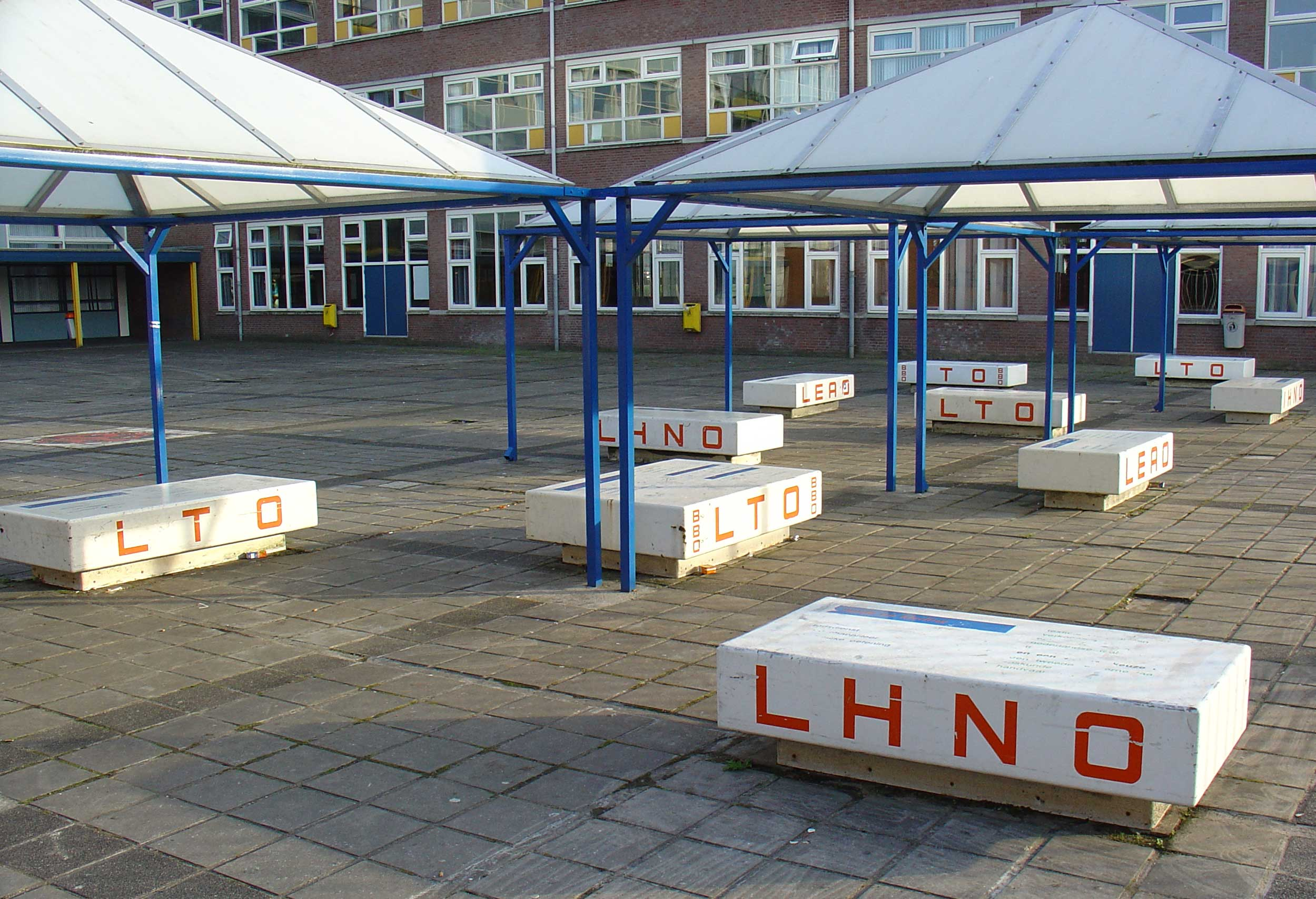 Tien banken (staal,1993) door Joep van Lieshout - school Kanaalstraat te Gouda